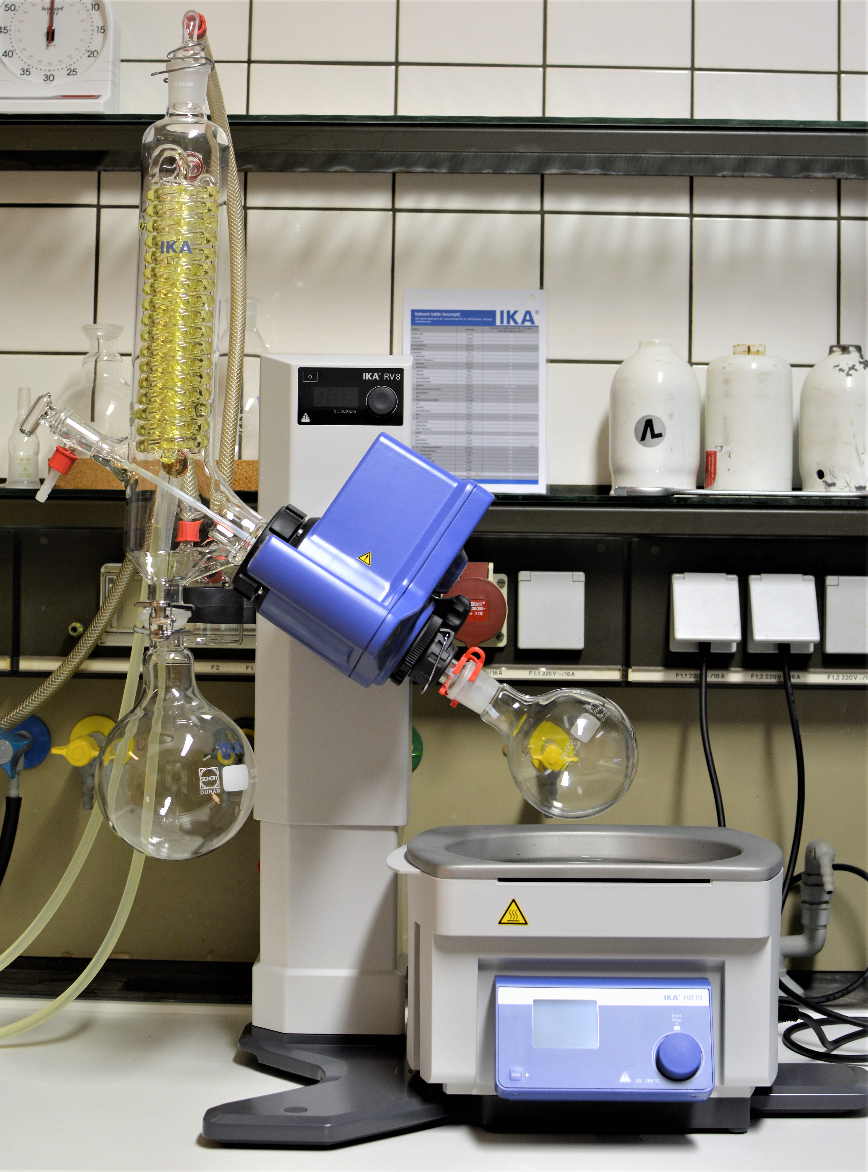 Fotografie eines Rotationsverdampfers